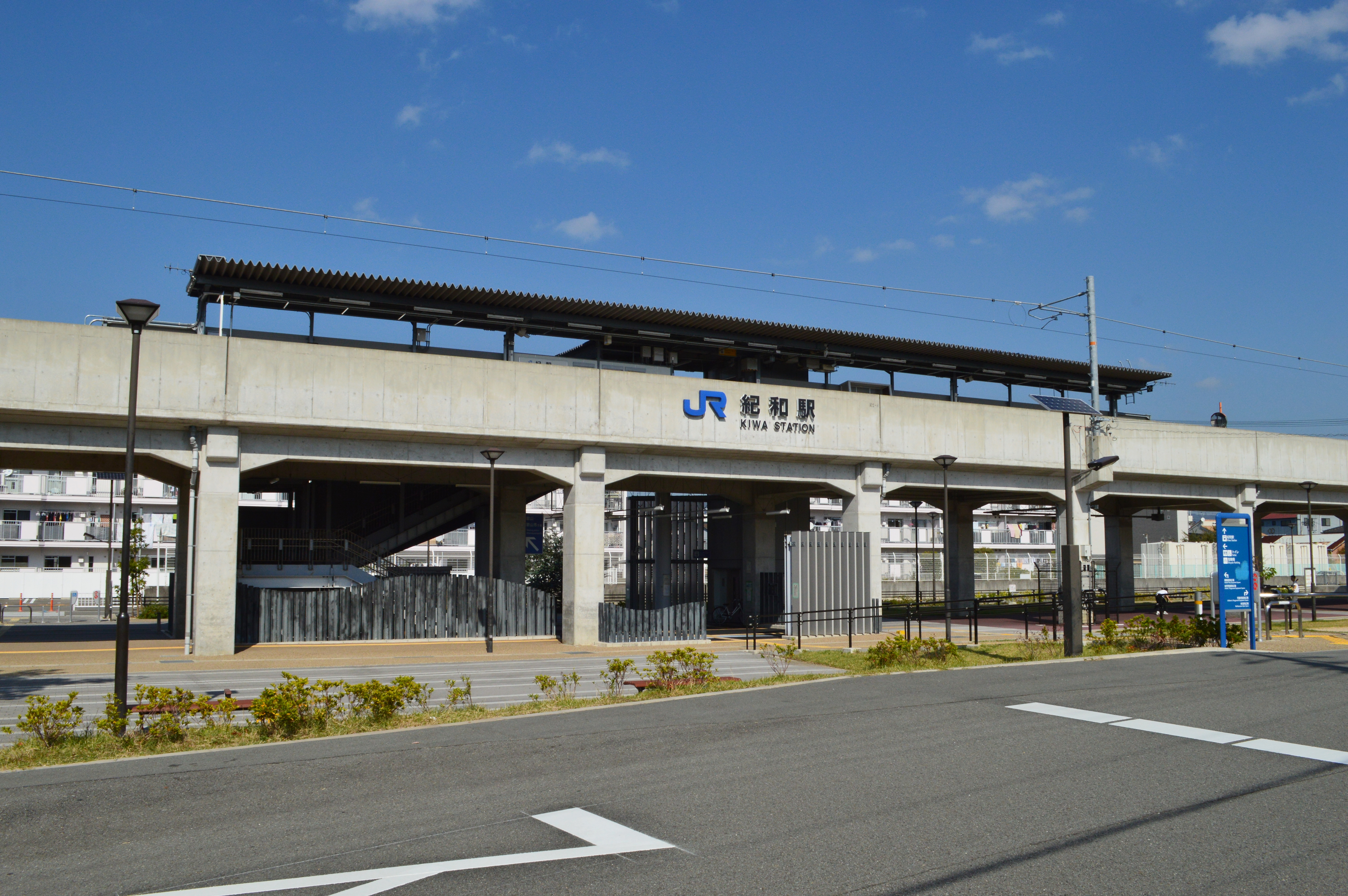 紀和駅 駅舎